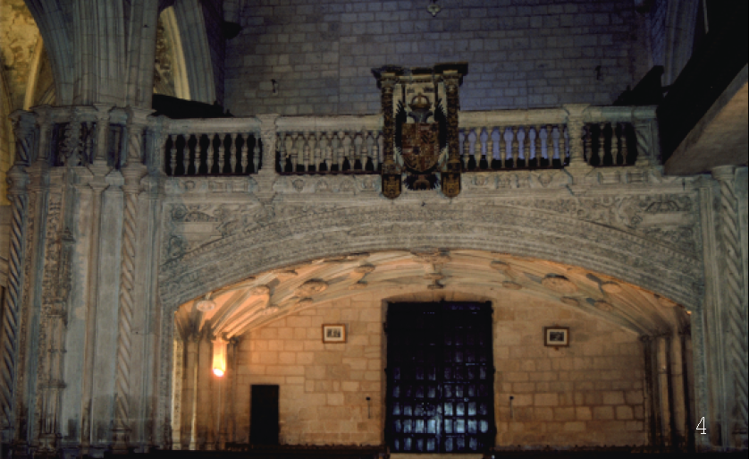 Santa Maria elizako korua, Agurain